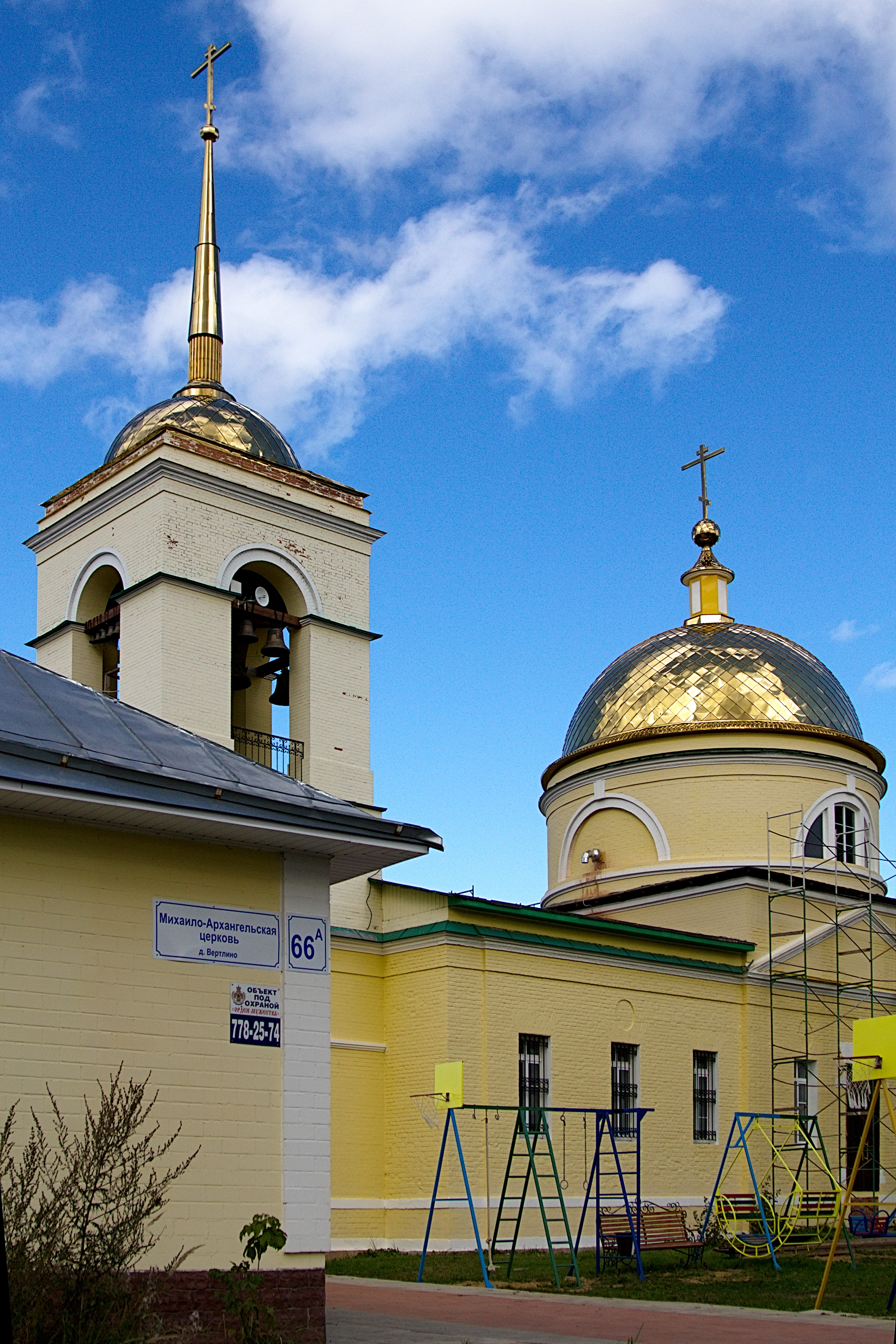 Михаило-Архангельская церковь, Московская обл., Солнечногорский район, д.Вертлино, 66а (08.09.12)